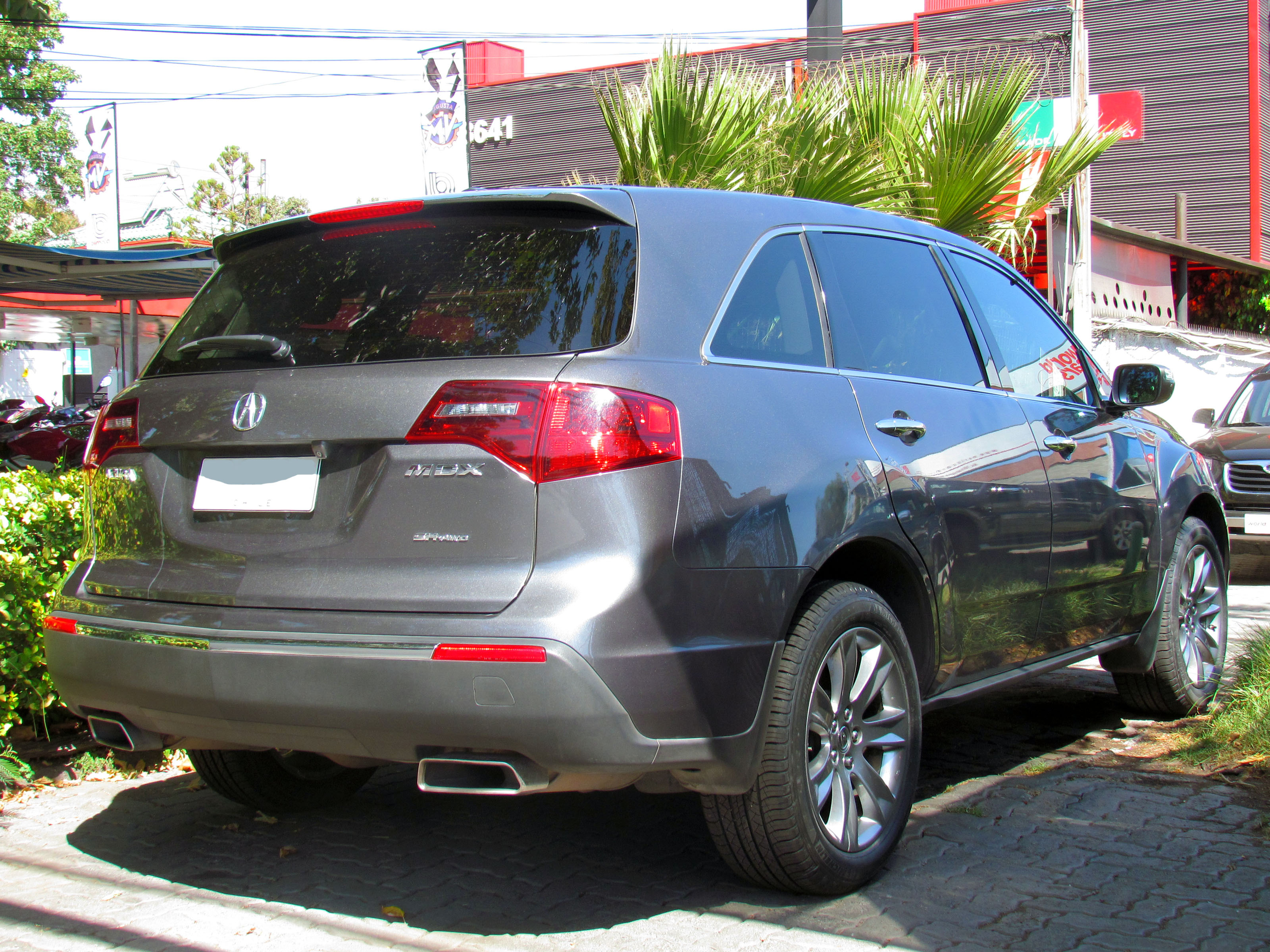 Acura MDX SH-AWD 2011